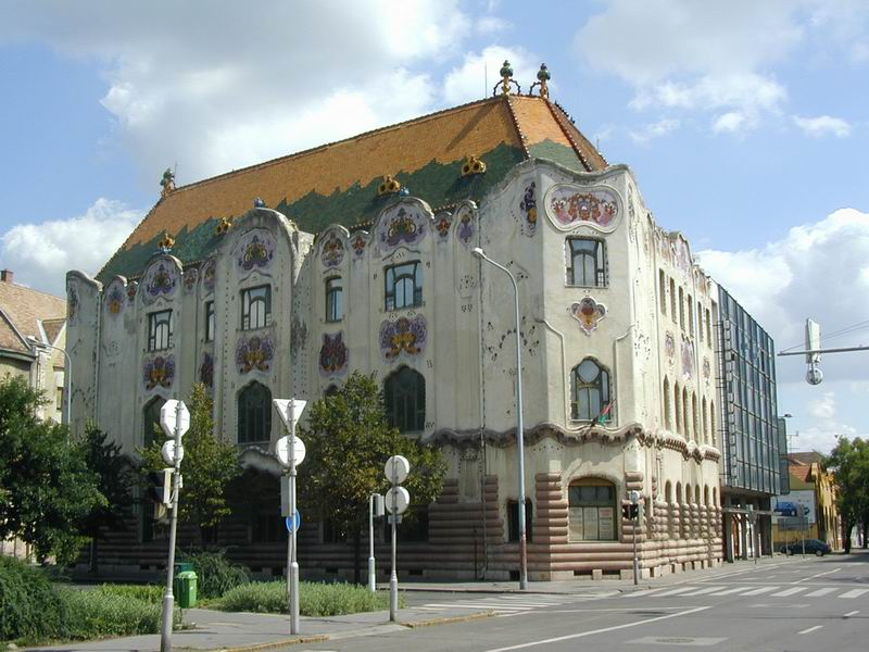 A kecskeméti Cifrapalota. Saját fotó.